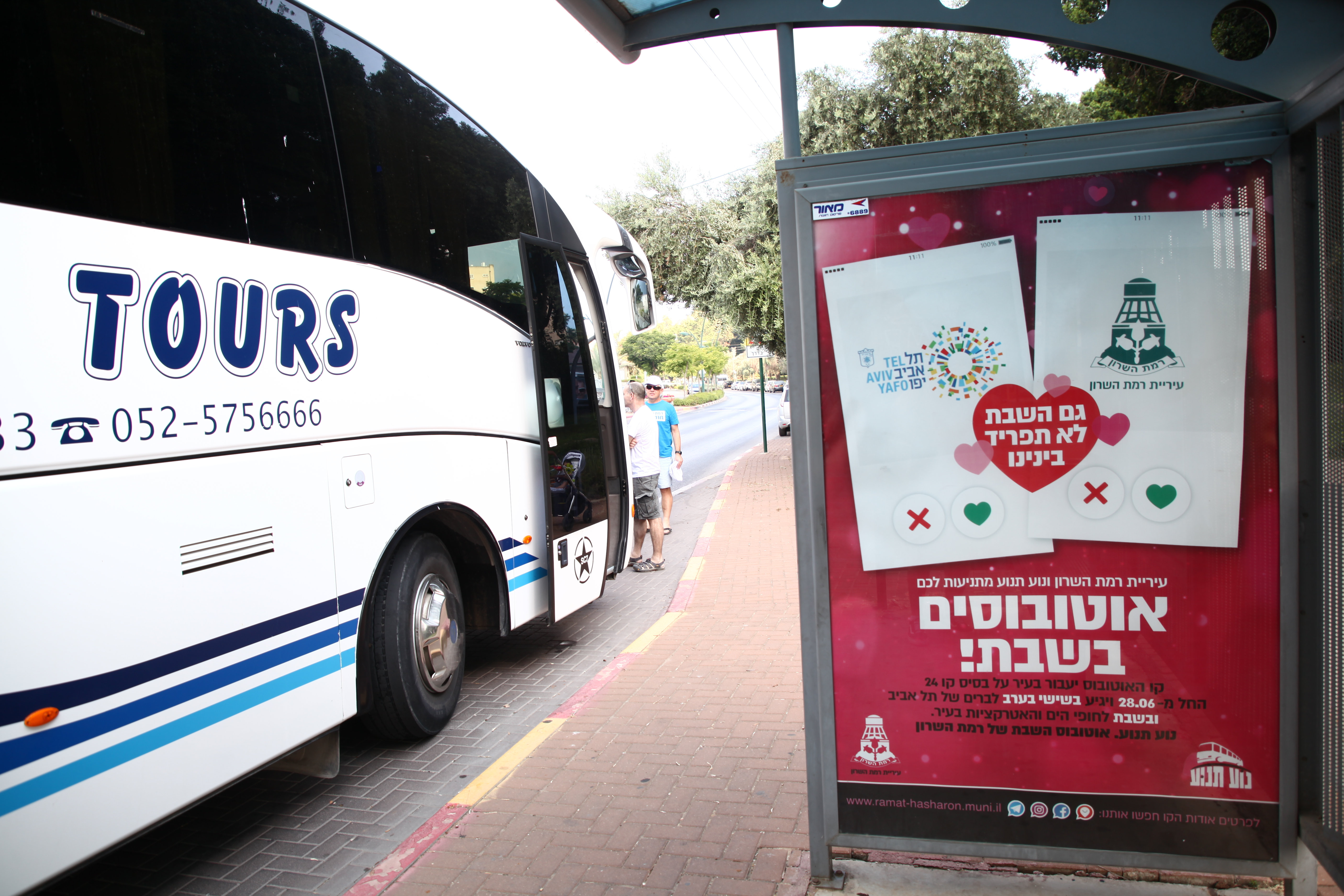 פרסום להפעלת אוטובוס של נוע תנוע בשבת, רמת השרון